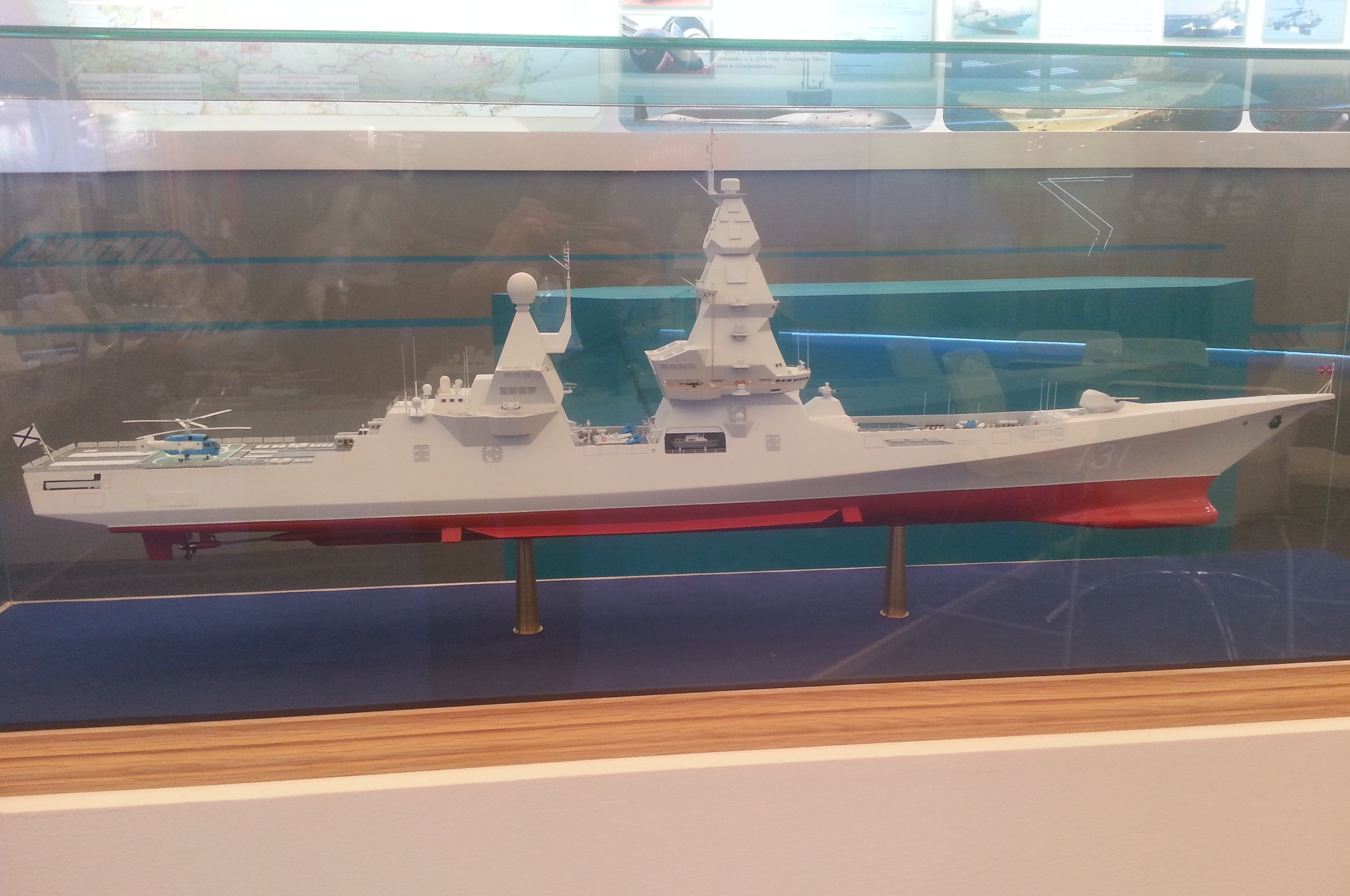 Макет эсминца проекта 23560 (шифр «Лидер») на выставке «Армия 2015»